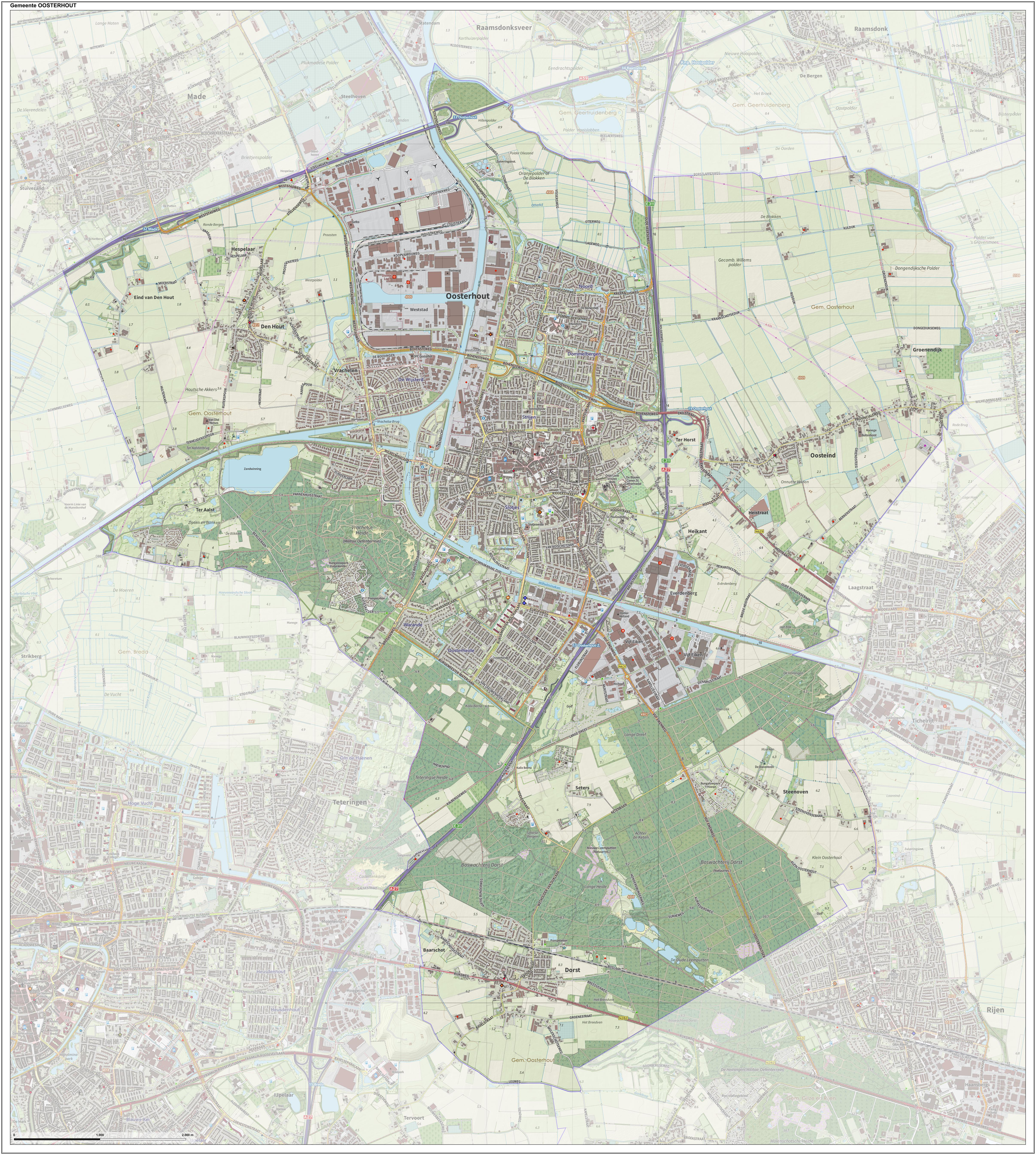 Topografische gemeentekaart. Resolutie: 400 pixels/km. Kaartbeeld samengesteld uit de open geodata van de Top10NL en Top25namen (Kadaster), Creative Commons-BY licentie. Gebouwvlakken uit open geodata BAG extract. Wegen uit de OpenStreetMap, OpenStreetMap community. Reliëfschaduw uit de Actuele Hoogtekaart AHN2. Samenstelling en kleurenschema: Jan-Willem van Aalst, met QGIS. Zie ook de Legenda.